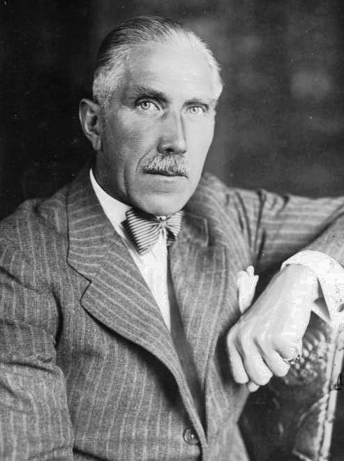 Franz von Papen Der deutsche Botschafter v. Papen, der im Auftrage der Reichsregierung in Ankara den Deutsch-Türkischen Freundschaftsvertrag unterzeichnete. Scherl Archiv [1936] [Franz von Papen (Porträt)] Abgebildete Personen: Papen, Franz von: Reichskanzler, Vizekanzler, Botschafter, Deutschland